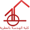 شعار الكلية